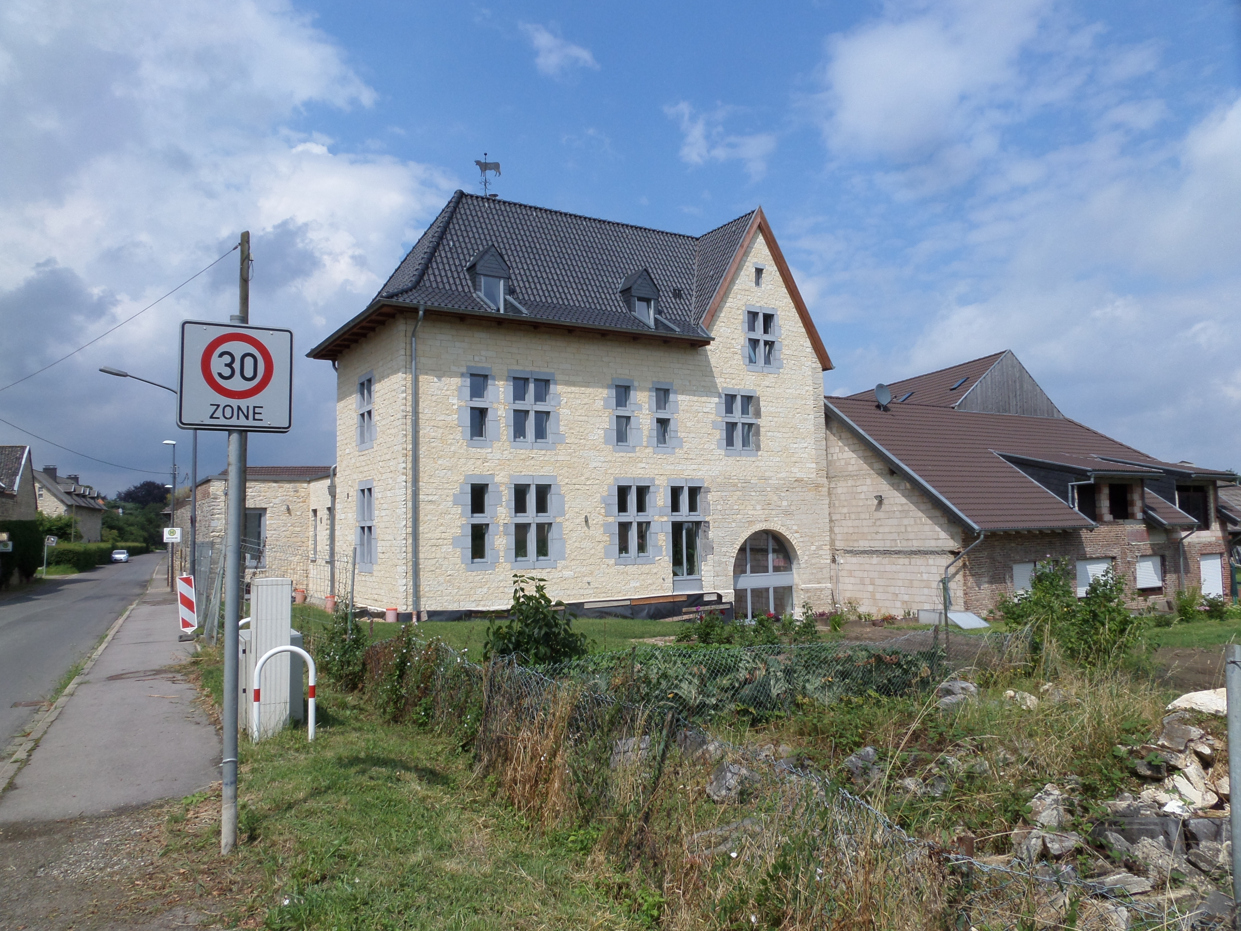 Laurensberger Straße 20 in Vetschau nach der Renovierung